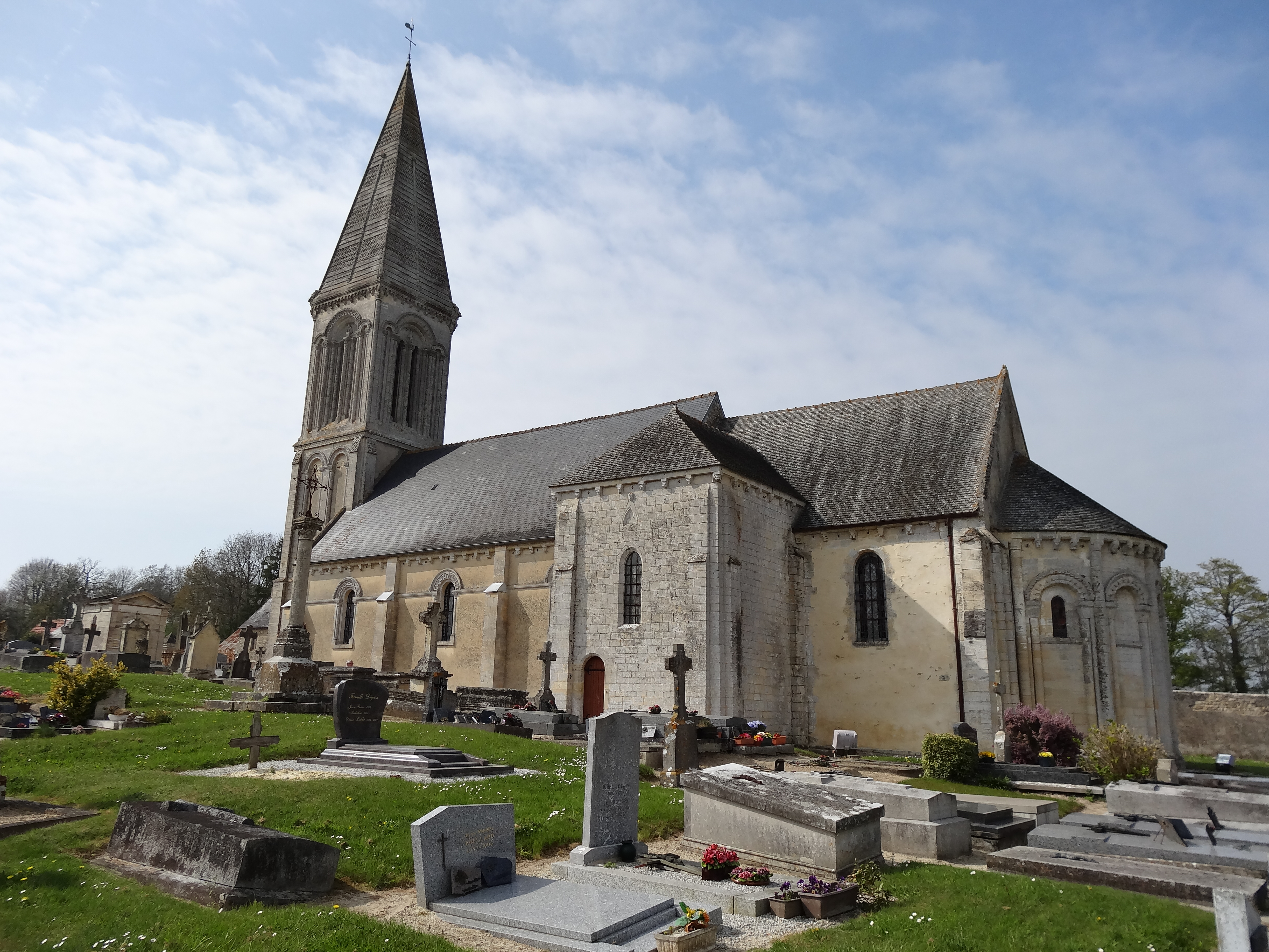 façade sud de l'église St Germain de Guéron